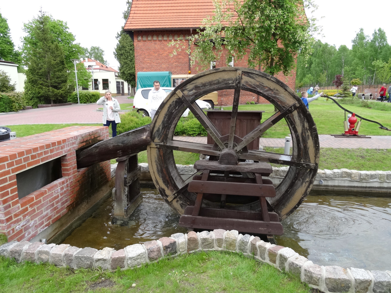 Muzeum Wodociągów na terenie stacji wodociągów miejskich Las Gdański (1900 r.) przy ul. Gdańskiej 242 w Bydgoszczy